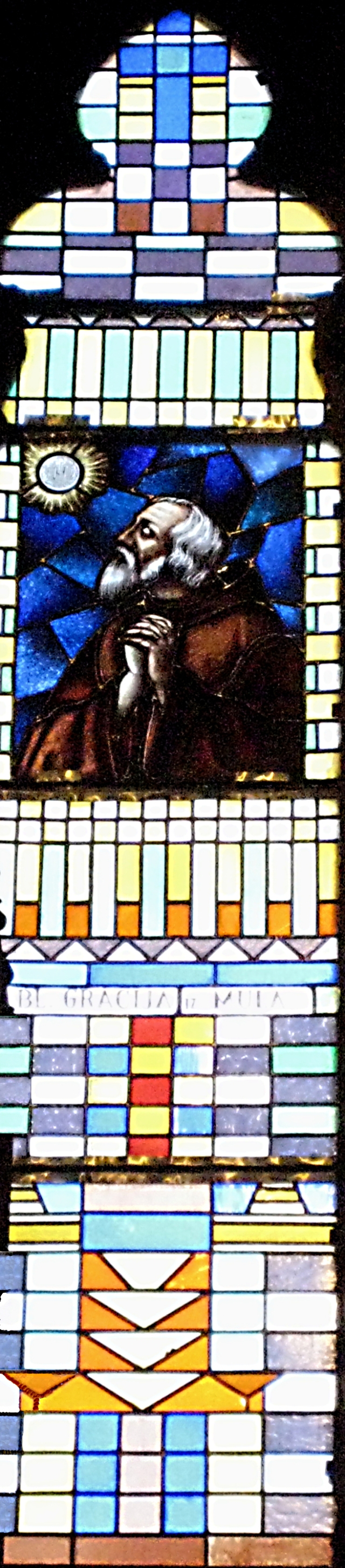 vitraj blaženog Gracija iz Mula u crkvi Gospe Lurdske, Rijeka